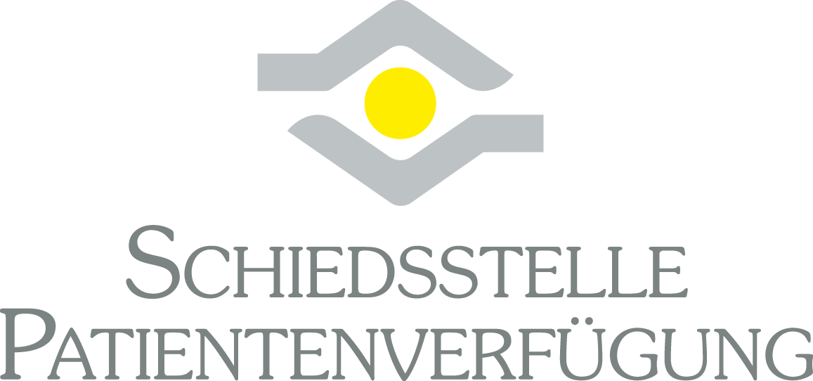 Logo der Schiedsstelle Patientenverfügung der Patientenschutzorganisation Deutsche Hospiz Stiftung